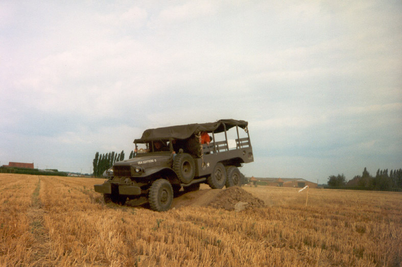 Dodge_WC63